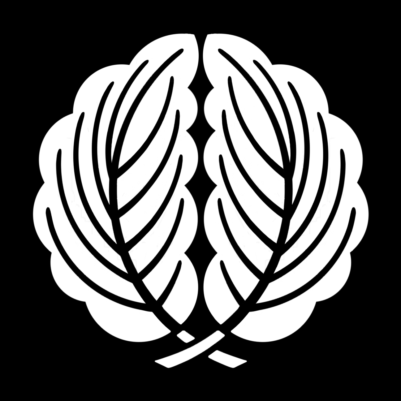 「抱き柏」紋（染抜）